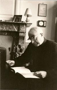 Jean Kobs (1912-1981), poète belge